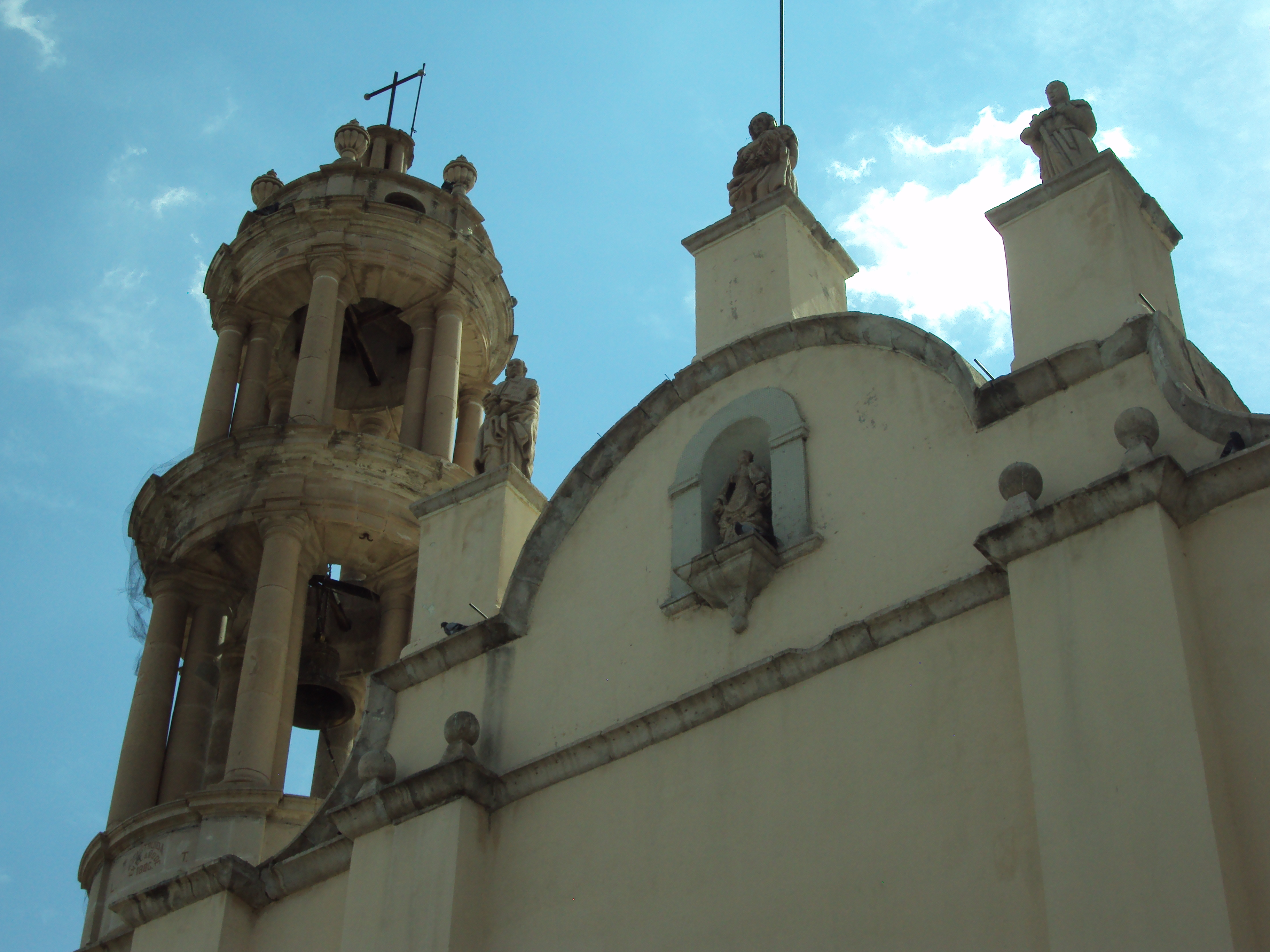 Detalle de facha y campanario del Santuario de Guadalupe en Chihuahua, Chihuahua